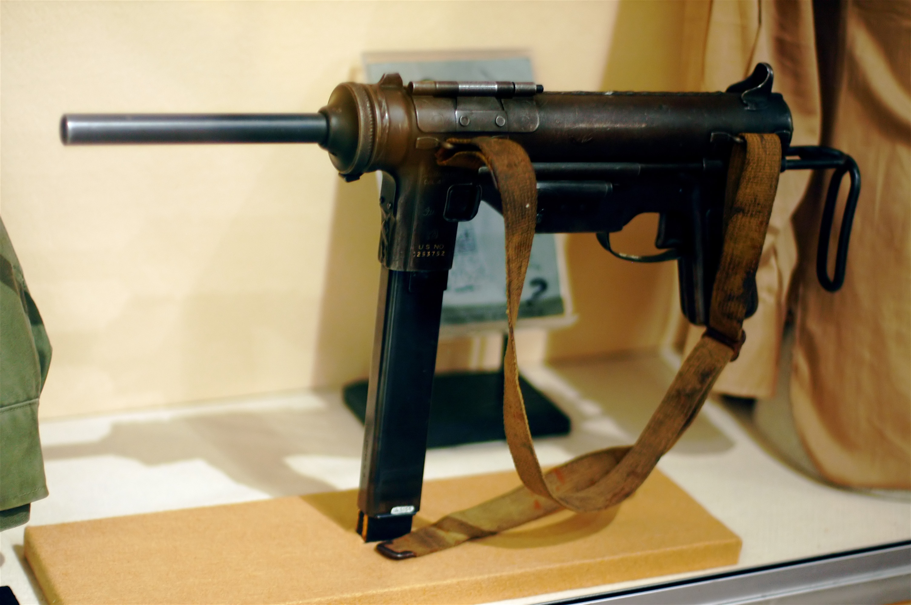 Pistolet maszynowy M3 Grease Gun wystawiany w Fort Meade Museum.